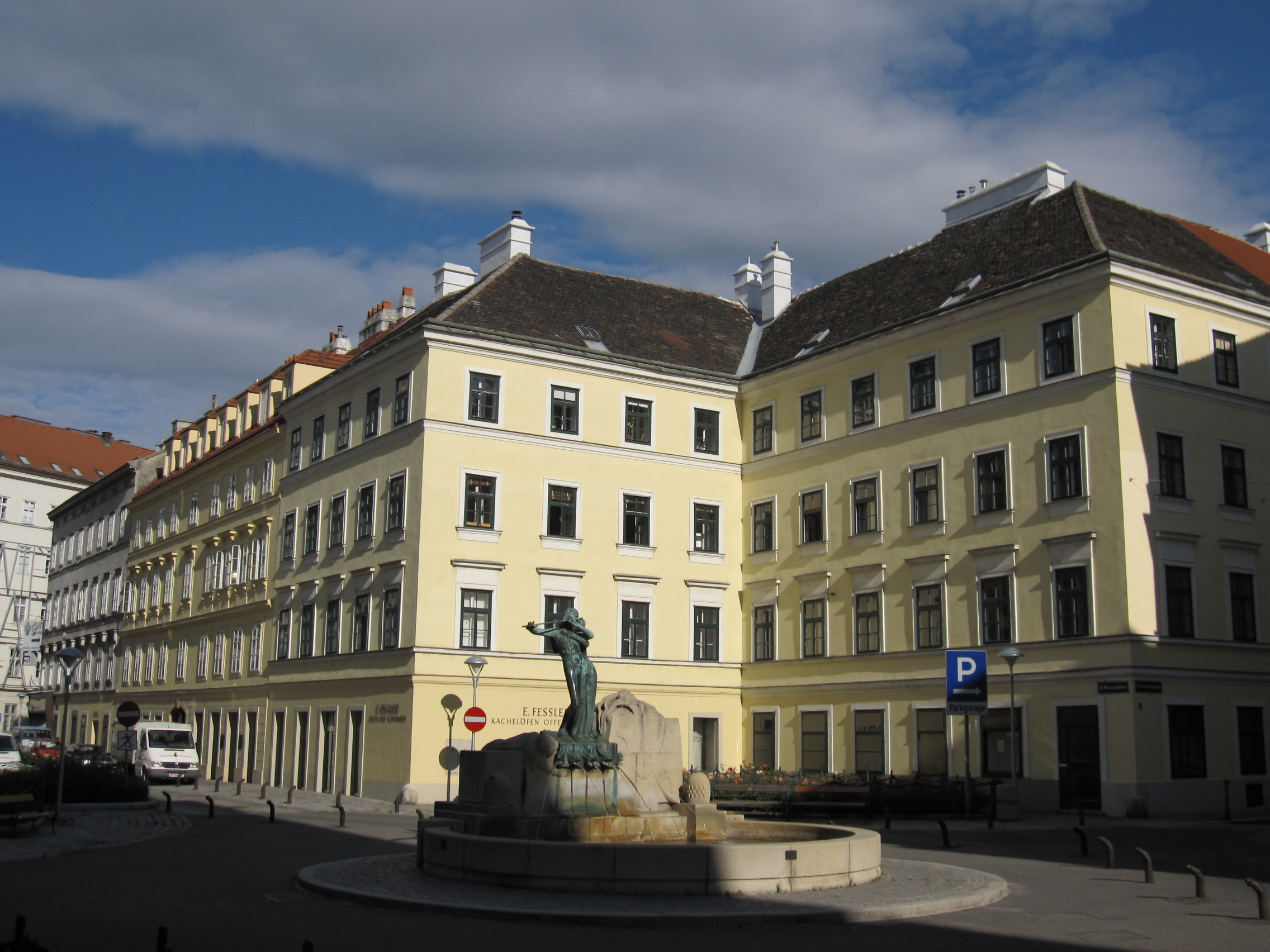 E. Fessler